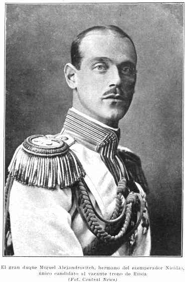 Michele Alexandrovitch fratello dello zar Nicola II di Russia